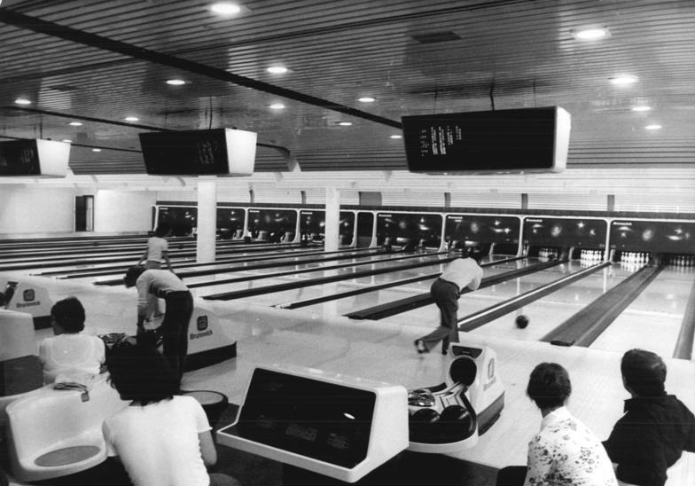 Berlin, Sport- und Erholungszentrum, Bowlingbahn ADN-ZB Link 18.3.81 Berlin: Das Sport- und Erholungszentrum in der Leninallee wurde am 20.3.81 eröffnet und von der Bevölkerung in Besitz genommen. Blick in die Bowlingbahn. - Zur Veröffentlichung mit ADN-Meldungen über Eröffnung. Freigabe erfolgt am 20.3.81